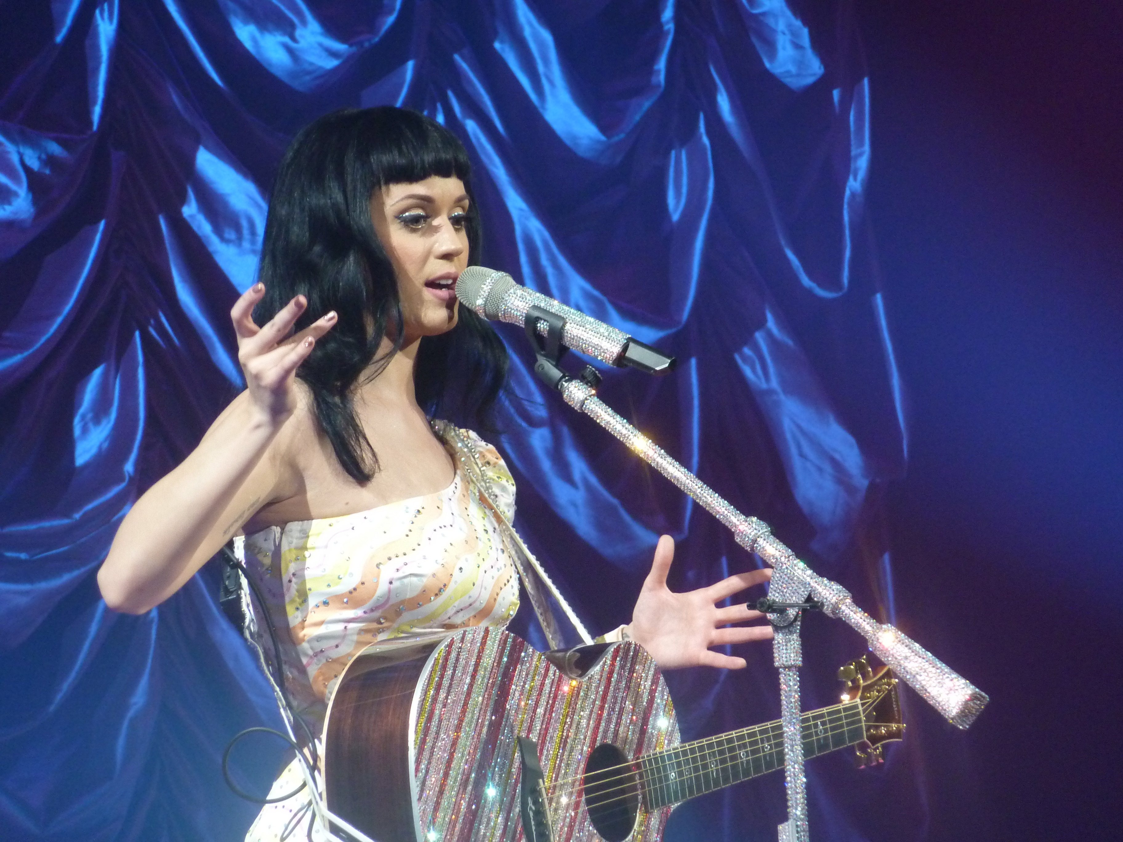 Katy Perry en concert le 08 mars 2011 au Zenith de Paris dans le cadre de sa tournée " California Dreams Tour ".